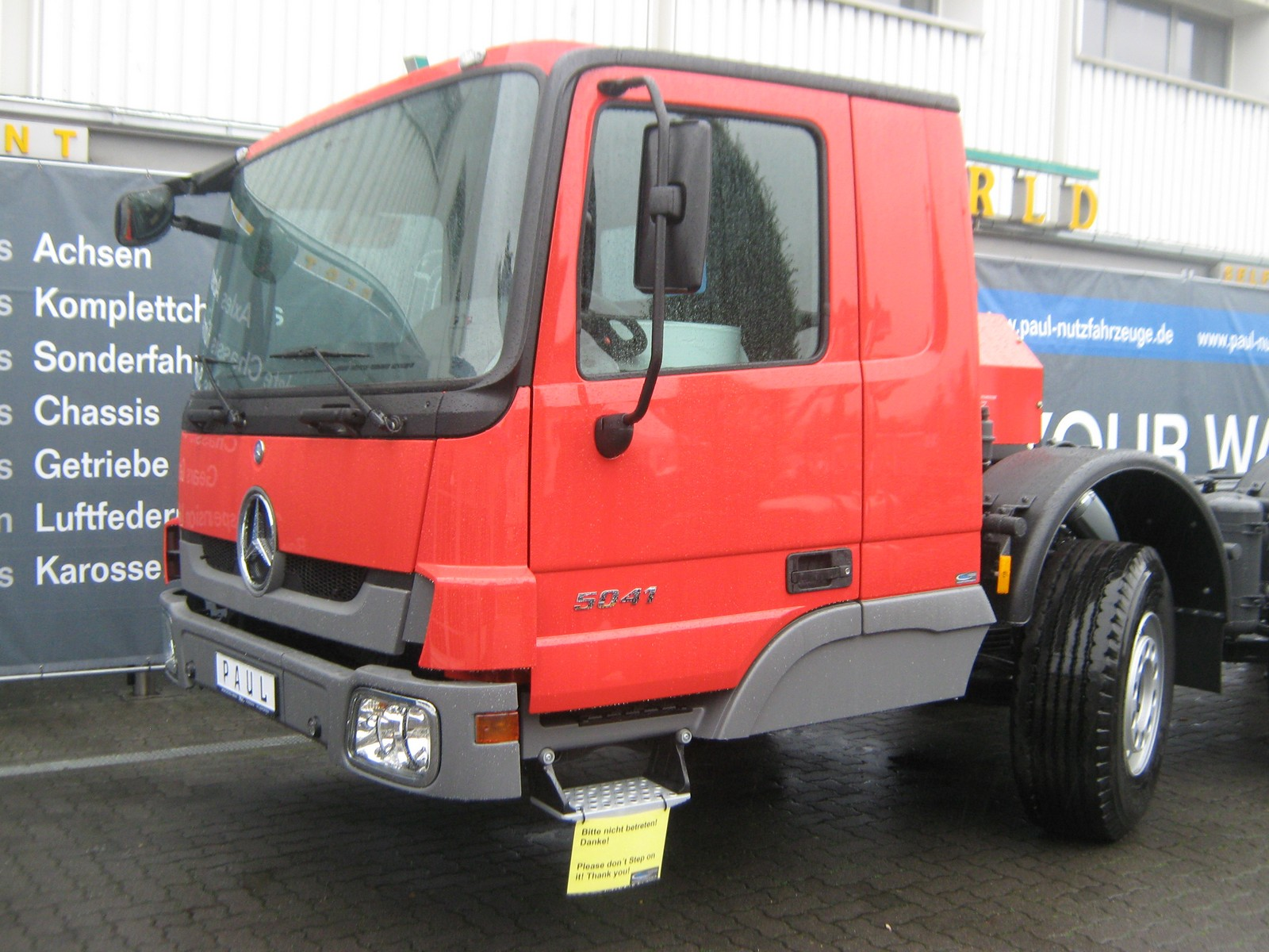 Internationale Automobilausstellung für Nutzfahrzeuge in Hannover 2010